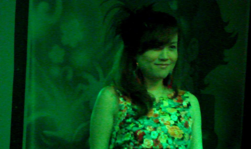 Yumi Matsuzawa en Anime Friends 2013 Buenos Aires, Argentina